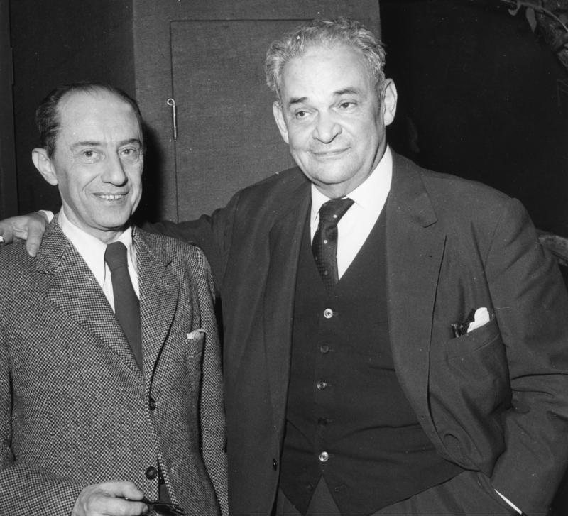 West-Berlin, Kortner inszenierte "Die Räuber" im Berliner Schiller Theater rechts: Fritz Kortner links: Curt Bois Am 20.2.1959 gelangen im Berliner Schiller-Theater "Die Räuber" von Friedrich Schiller in der Inzenierung von Fritz Kortner zur Aufführung. Die Hauptrollen spielen Franz Nicklisch, Erich Schellow, Rolf Henninger, Annemarie Düringer, Curt Bois, Lothar Blumhagen, Edgar Ott, Stefan Wigger, Klaus Herm, Thomas Holzmann, Joseph Noerden, Claus Hofer, Walter Bluhm, Wilhelm Borchert, Hans Herrmann-Schaufuss und Georg Völkel.